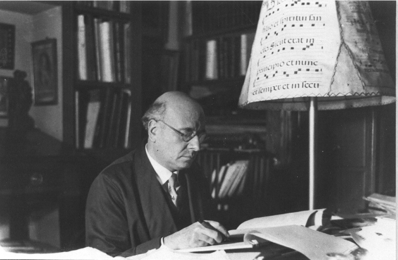 Henri Prunières, dit Henry Prunières (pseudonyme de sa jeunesse: Henry Debusne). (* Paris, 24 mai 1886 - † Nanterre, 11 avril 1942) est un musicologue français